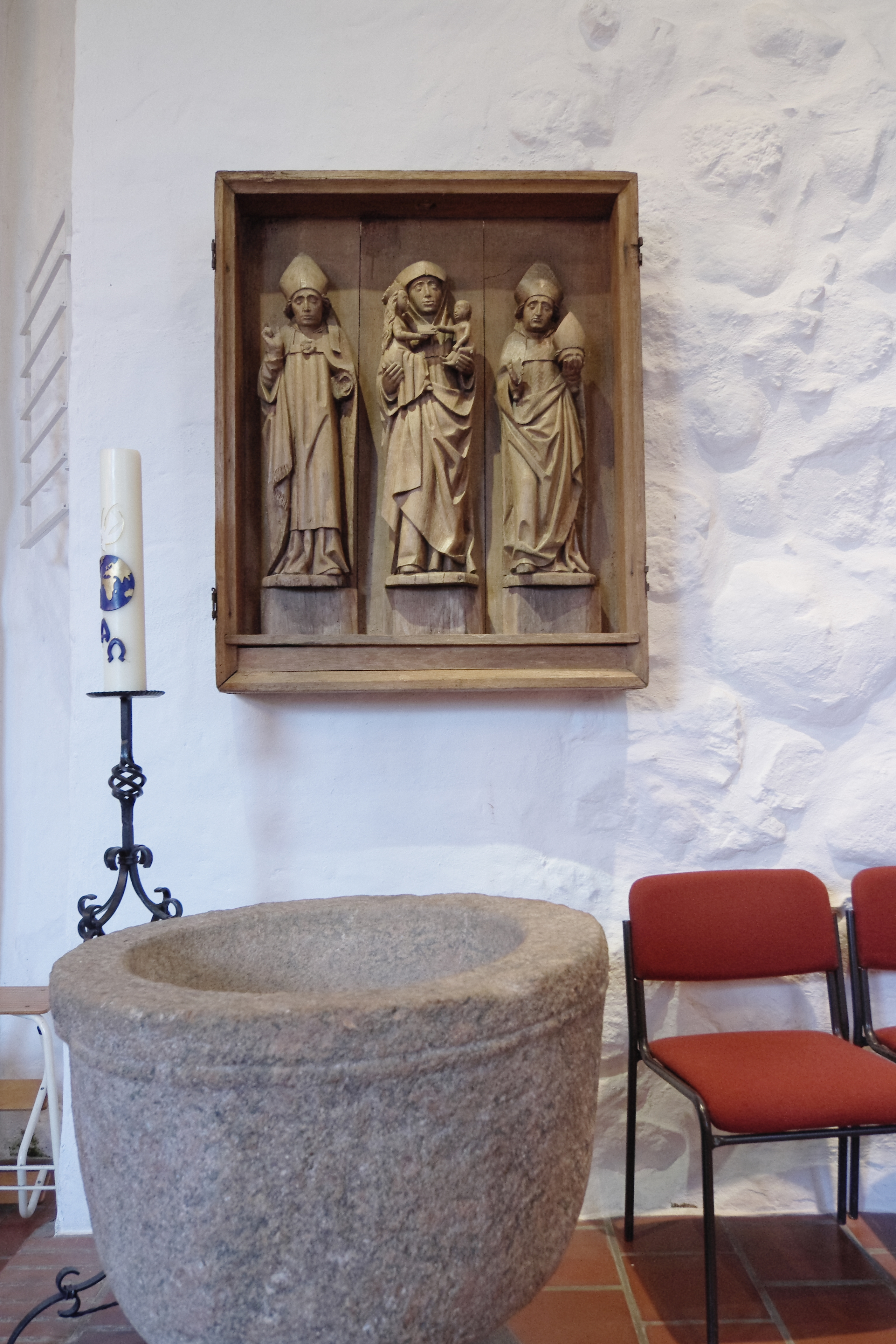 St. Annen zu Taarstedt, Kreis Schleswig-Flensburg. Mittelalterlicher Seitenaltar an der Nordwand des Chors, in der Mitte Anna-Selbdritt, seitlich der Hl. Dionysos und ein unbekannter Bischof. Davor der Taufstein aus Granit, 12. Jh.